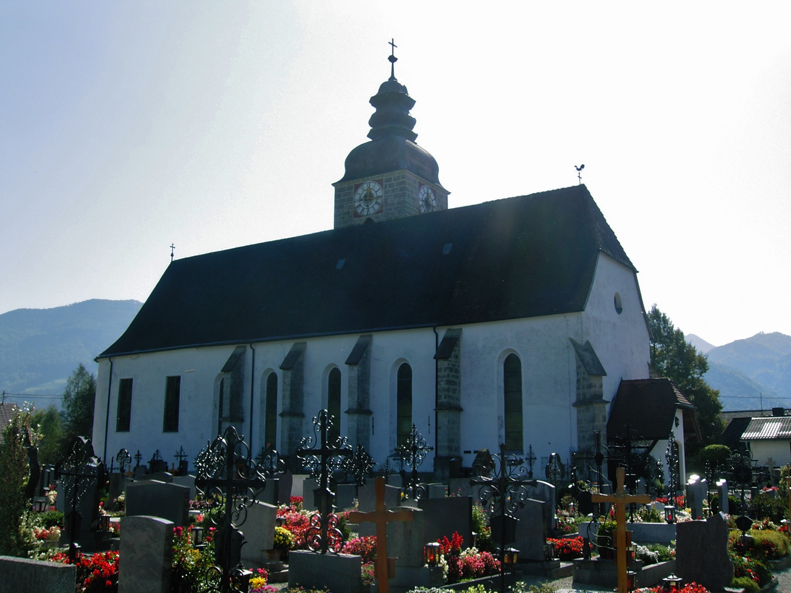 Großraming Katholische Pfarrkirche hl.Jakobus der Ältere und Friedhof, Nordansicht